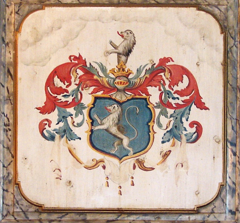 Løvenskiolds våben fra Solum Kirke, Telemark